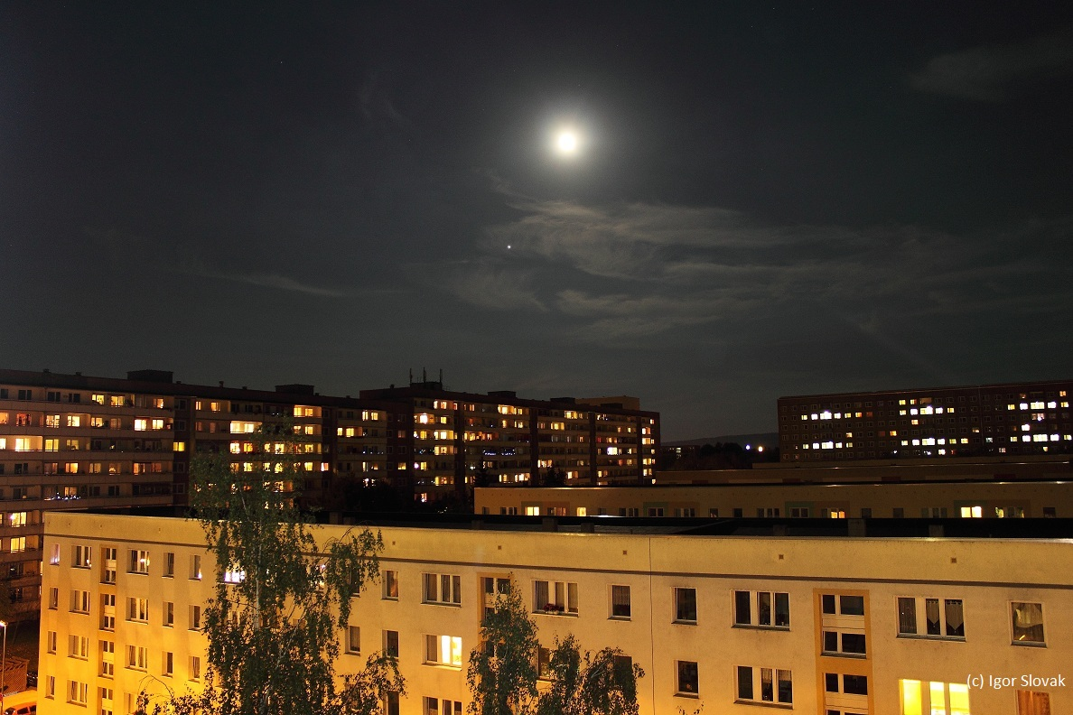 Lobeda-West bei Nacht